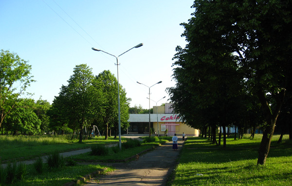 Lviv, park "Horikhovyi Hay", cinema "Sokil"